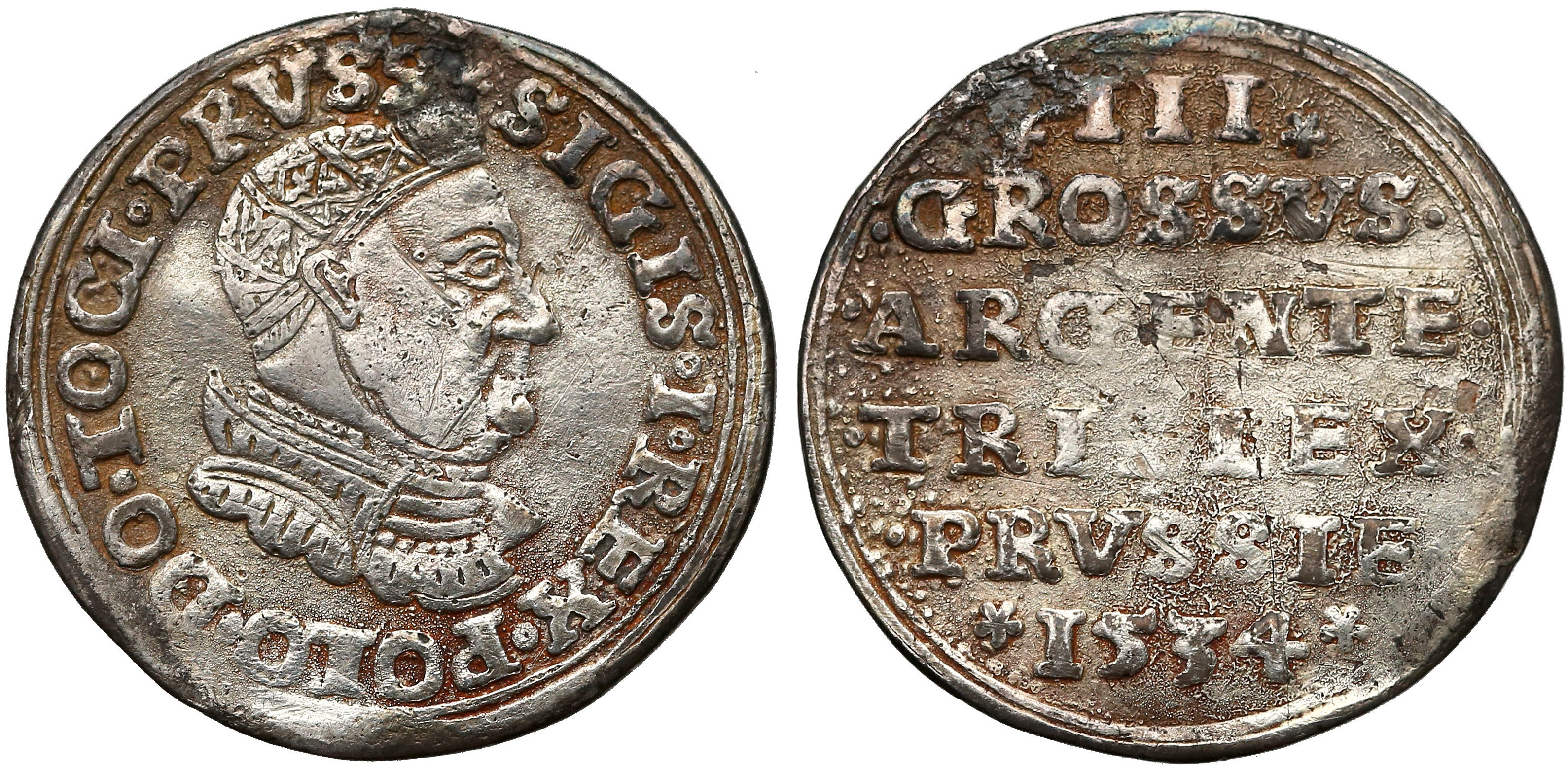 Trojak miejski Toruń 1534